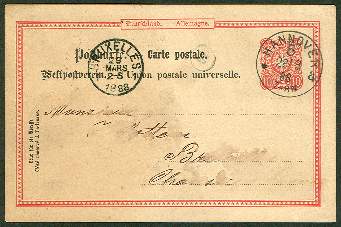 Sogenannte Klaucke-Stempel, hier mit Absende-Datum von Hannover am 28. März 1888 und Ankunfts-Datum am 29. März 1888 in Brüssel